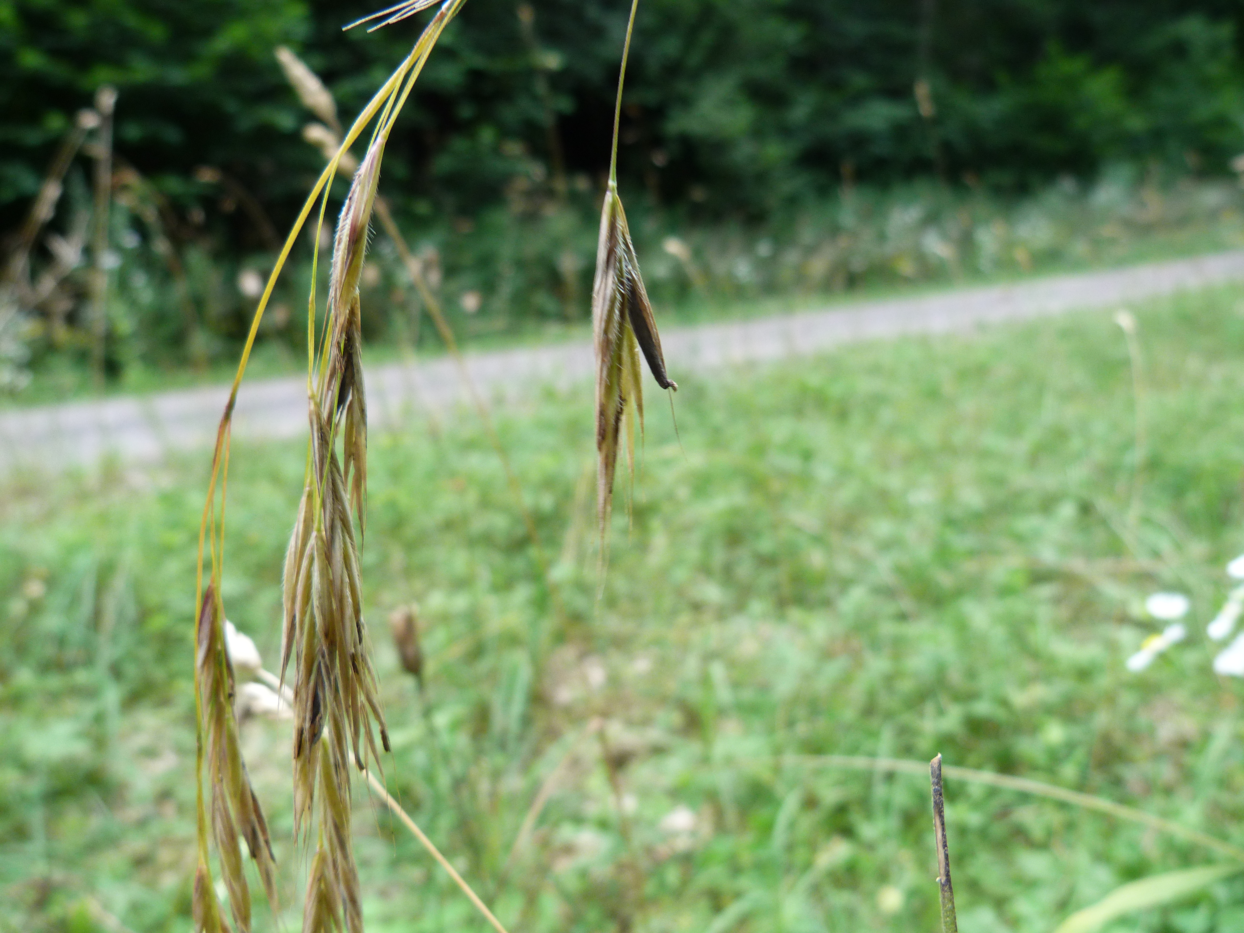 Ergot sur Bromus ramosus Savigny-lès-Beaune